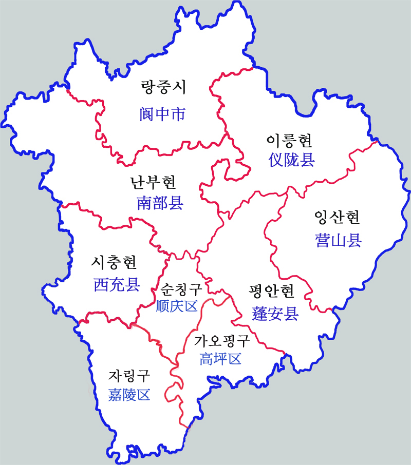 난충시 현급행정구역도